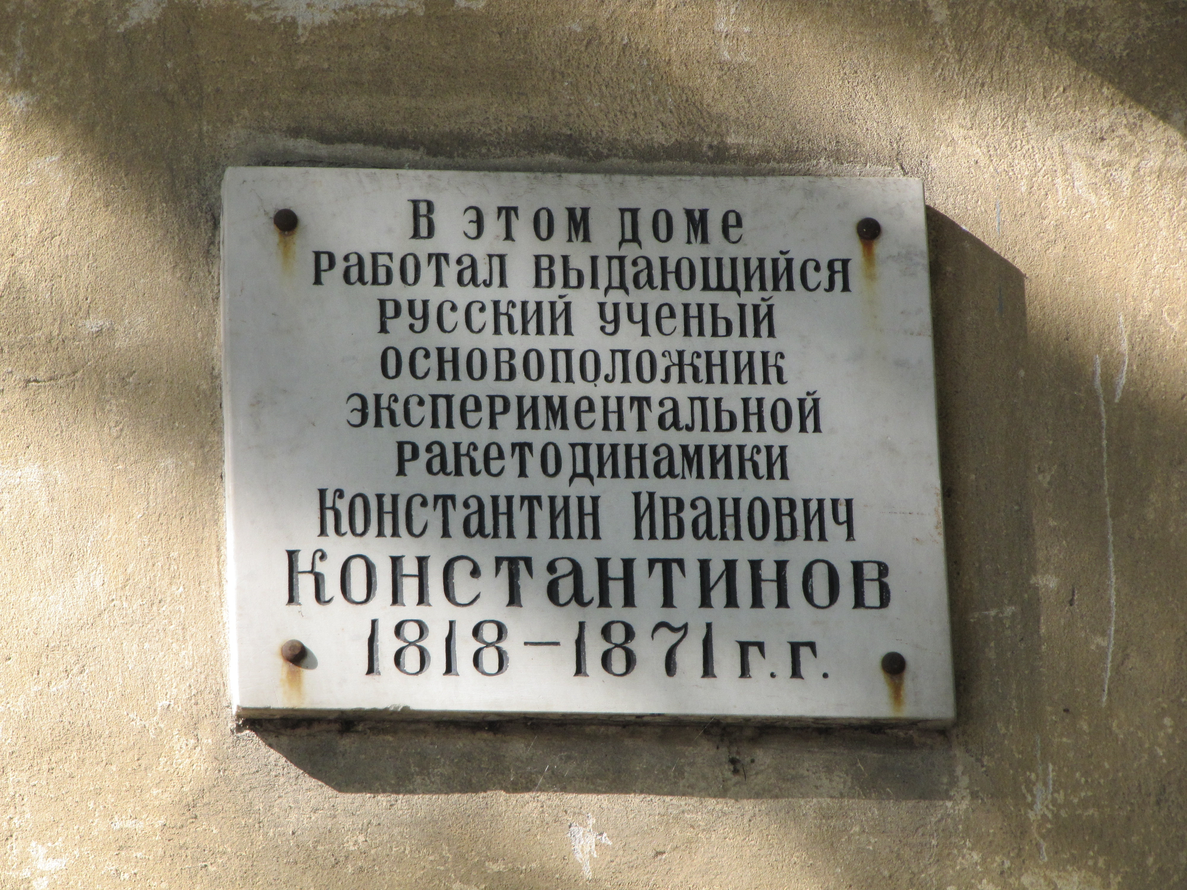 Меморіальна дошка на будинку де жив видатний вчений, засновник експерементальної ракетодинаміки Костянтин Константинов, м. Миколаїв Миколаївська весна у Вікіпедії